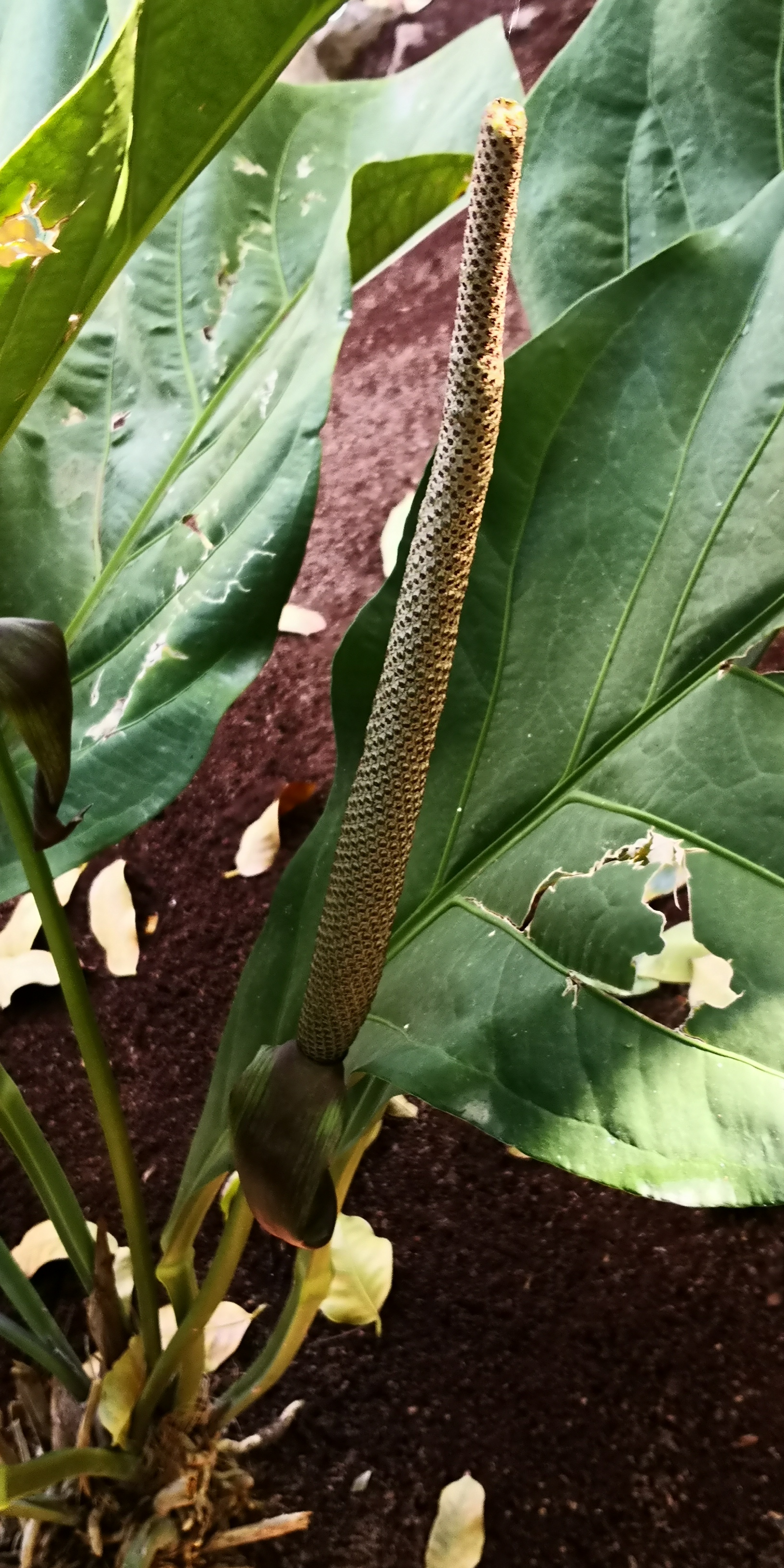 Standort: Palmetum, Santa Cruz de Tenerife, Kanarische Inseln, Spanien. Februar 2020. 28,452 -16,256